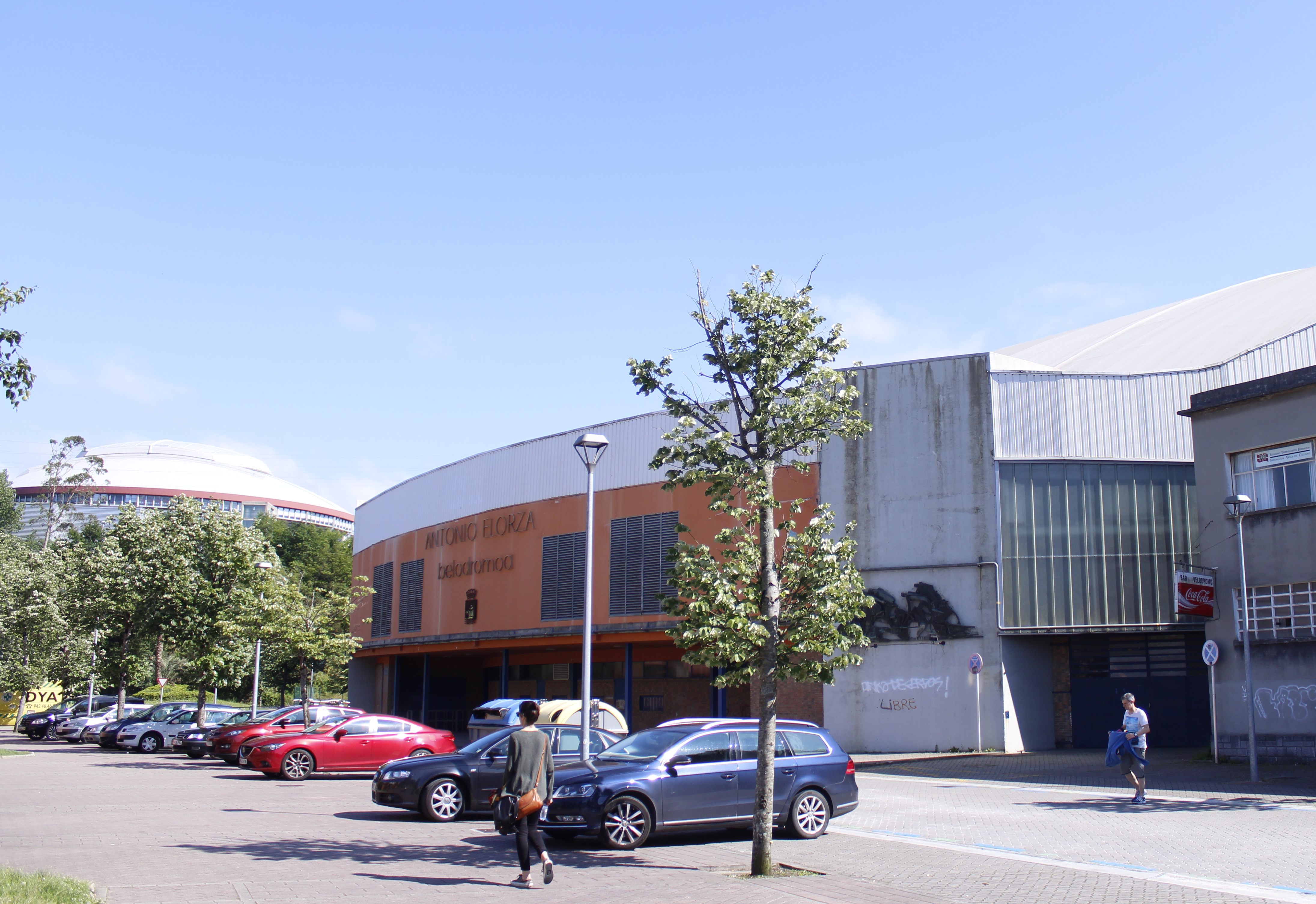 Antonio Elorza belodromoaren eraikina, Donostian, Amara auzoan